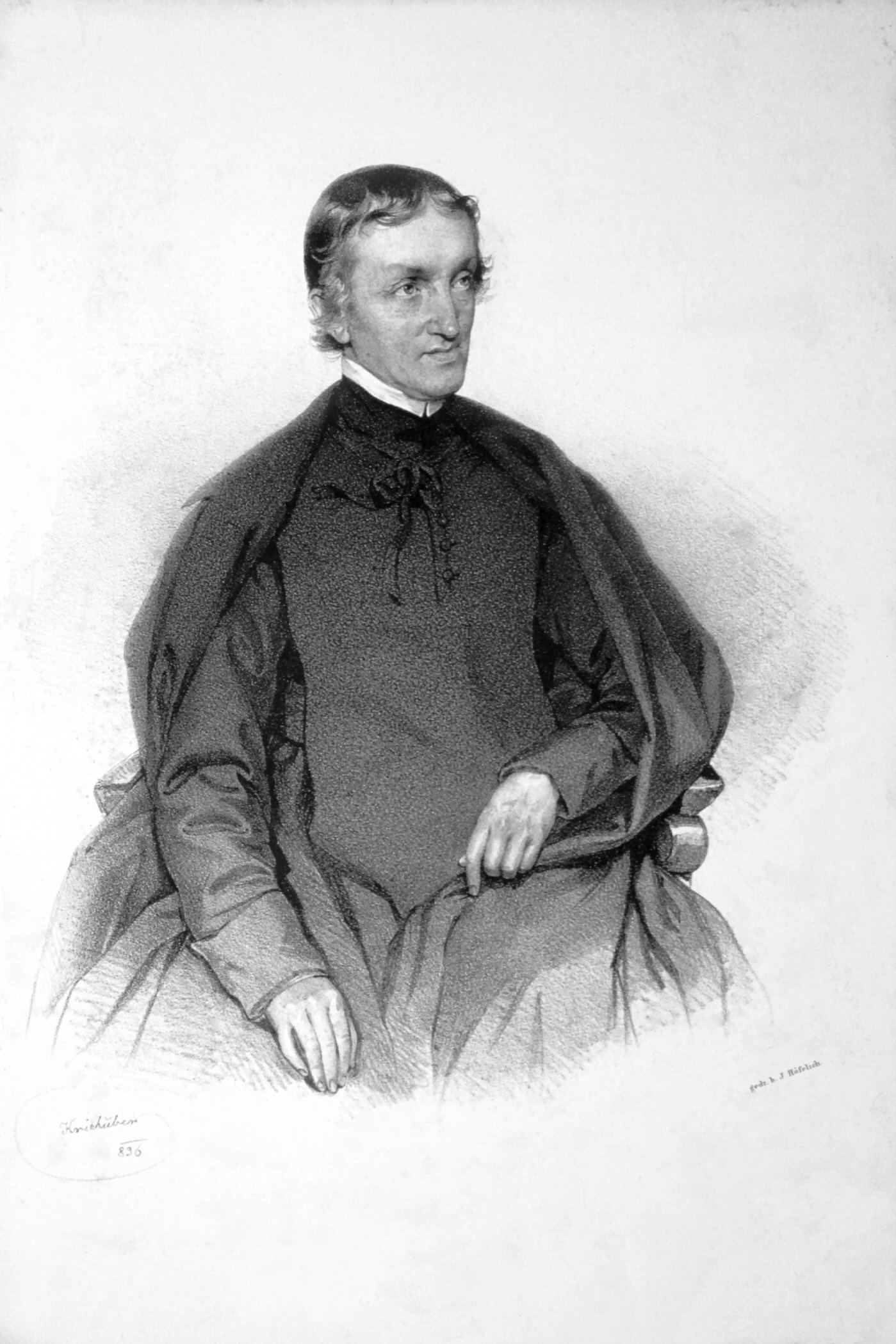 Wilhelm Eder (1781-1866), Benediktiner, Abt des Stiftes Melk; Lithographie von Josef Kriehuber, 1836